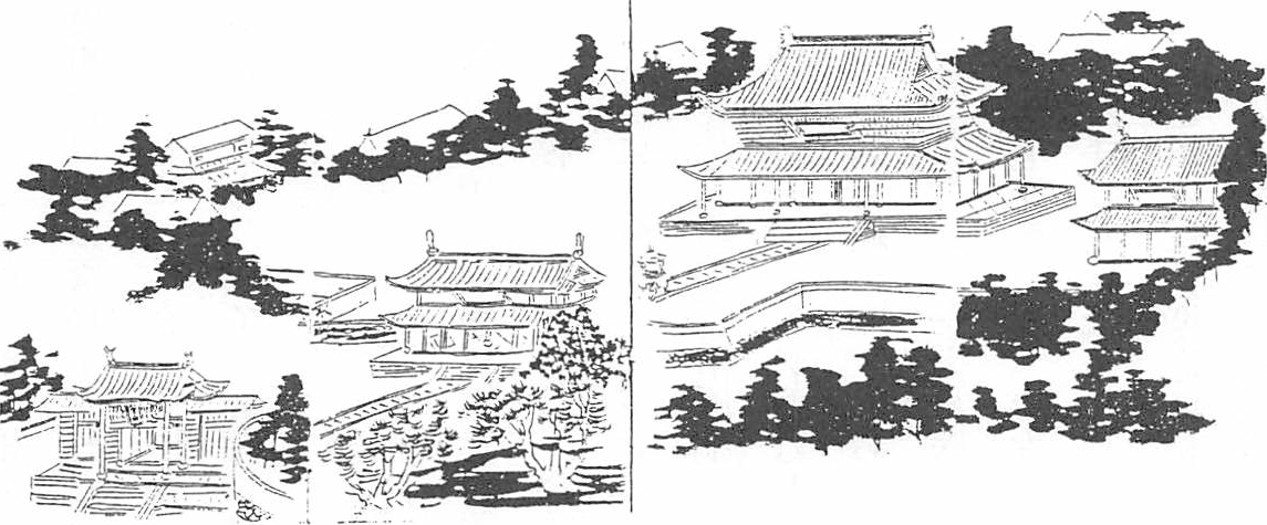 三皇廟の絵 『胡氏方案附録』清医胡兆新江相尋申度事 東北大学附属図書館狩野文庫